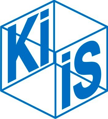 Киевский международный институт социологии (КМИС)